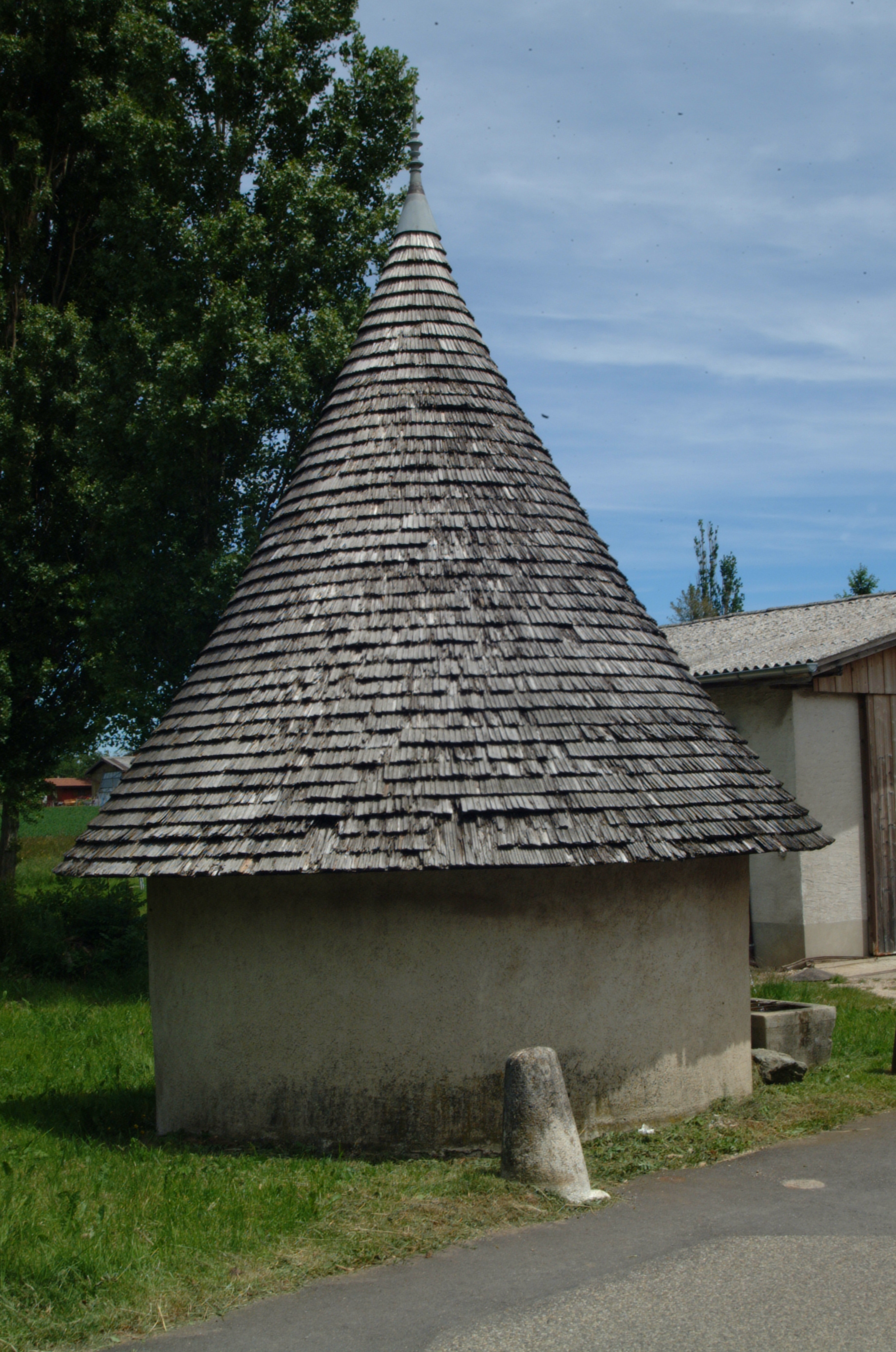 Vue extérieure de l'ancien puits